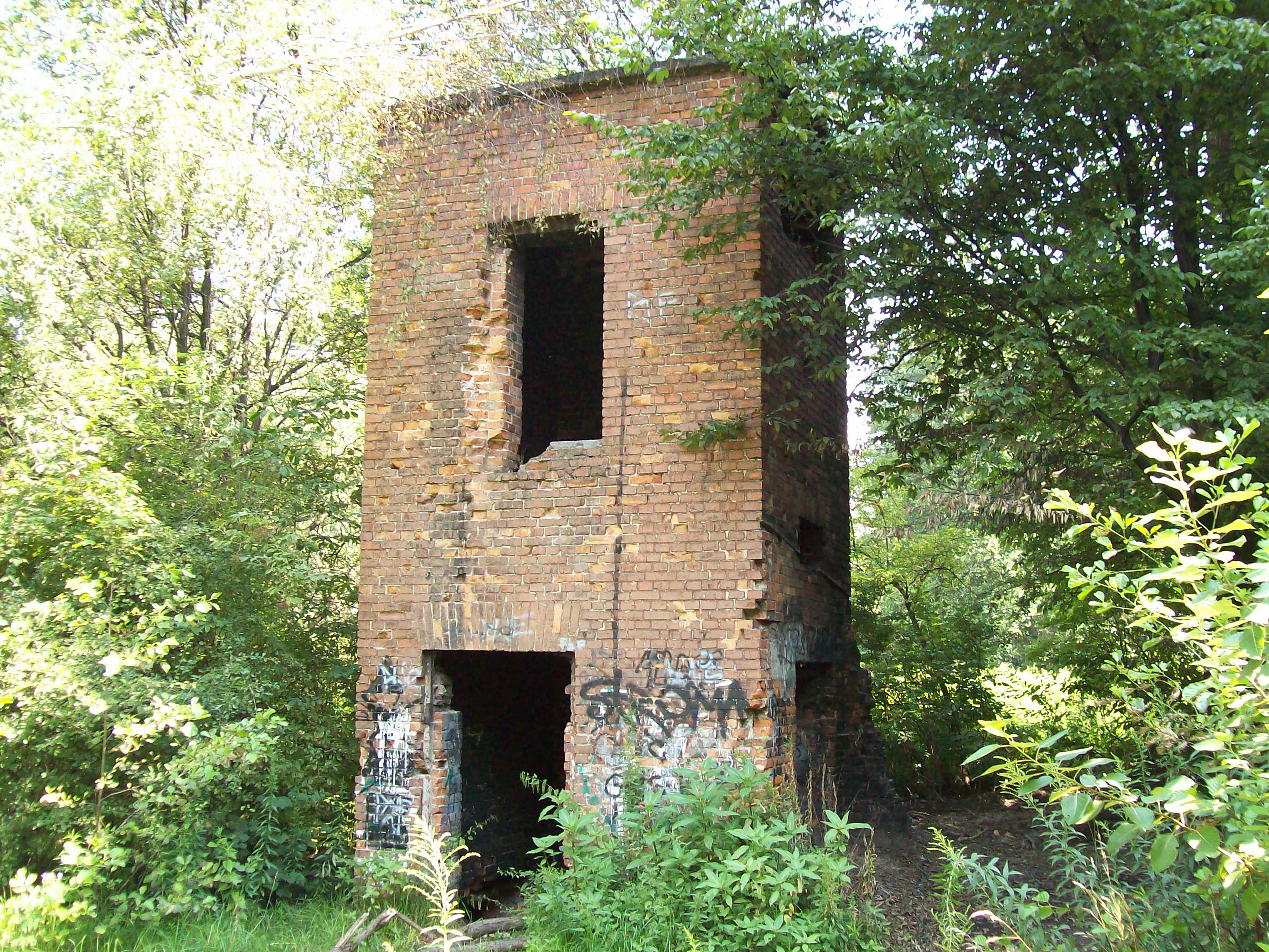 Ruiny młyna nad Ślepiotką,Katowice Piotrowice